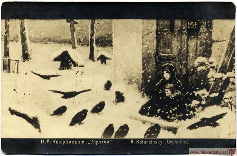 Дореволюционная открытка. Сиротки